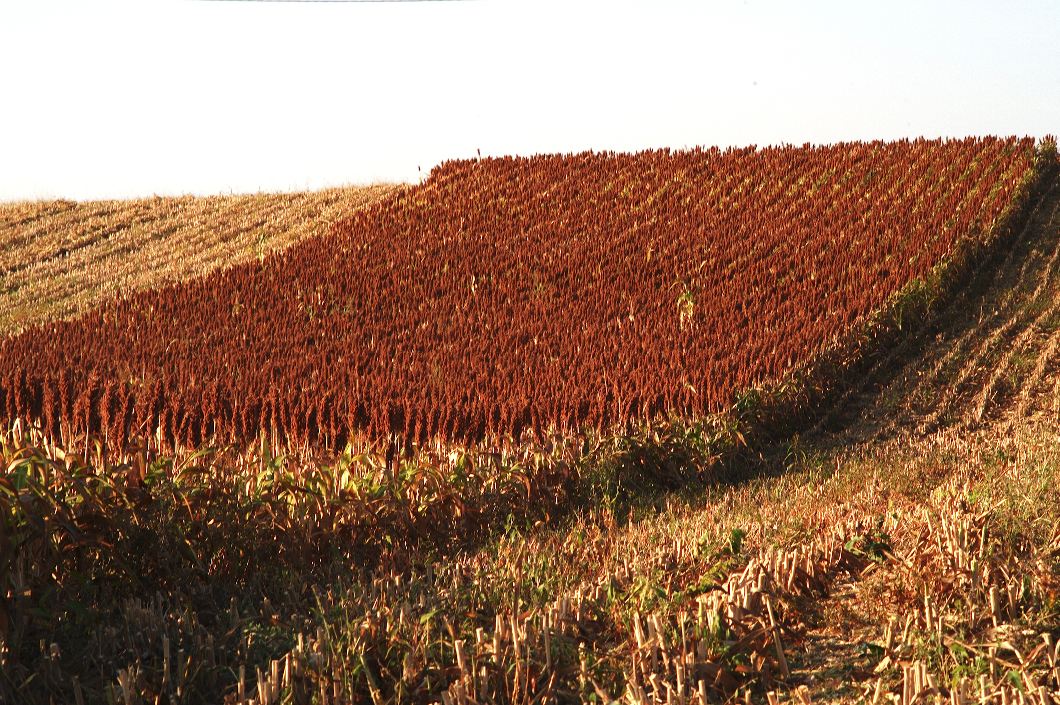 INRA, Jean Weber